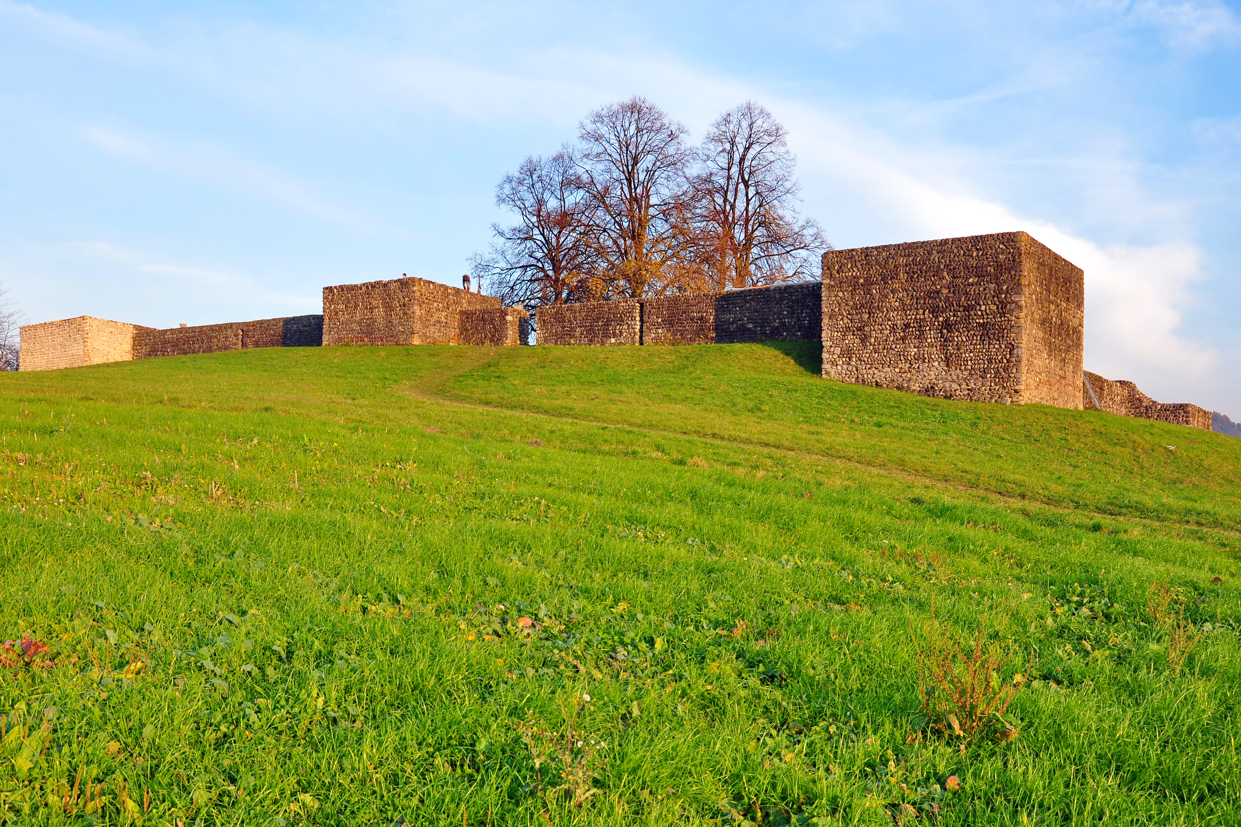 Castrum in Irgenhausen (Switzerland) as seen from Pfäffikersee (Lake Pfäffikon)